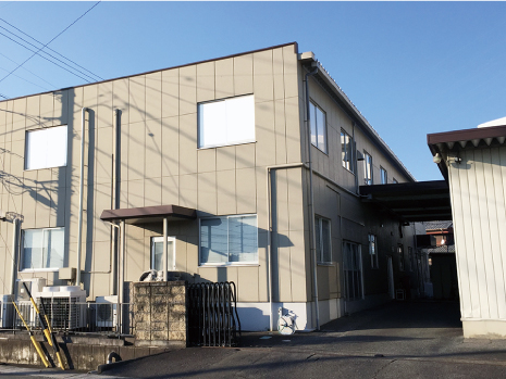 岐阜県本巣市宗慶の自社掛軸工房